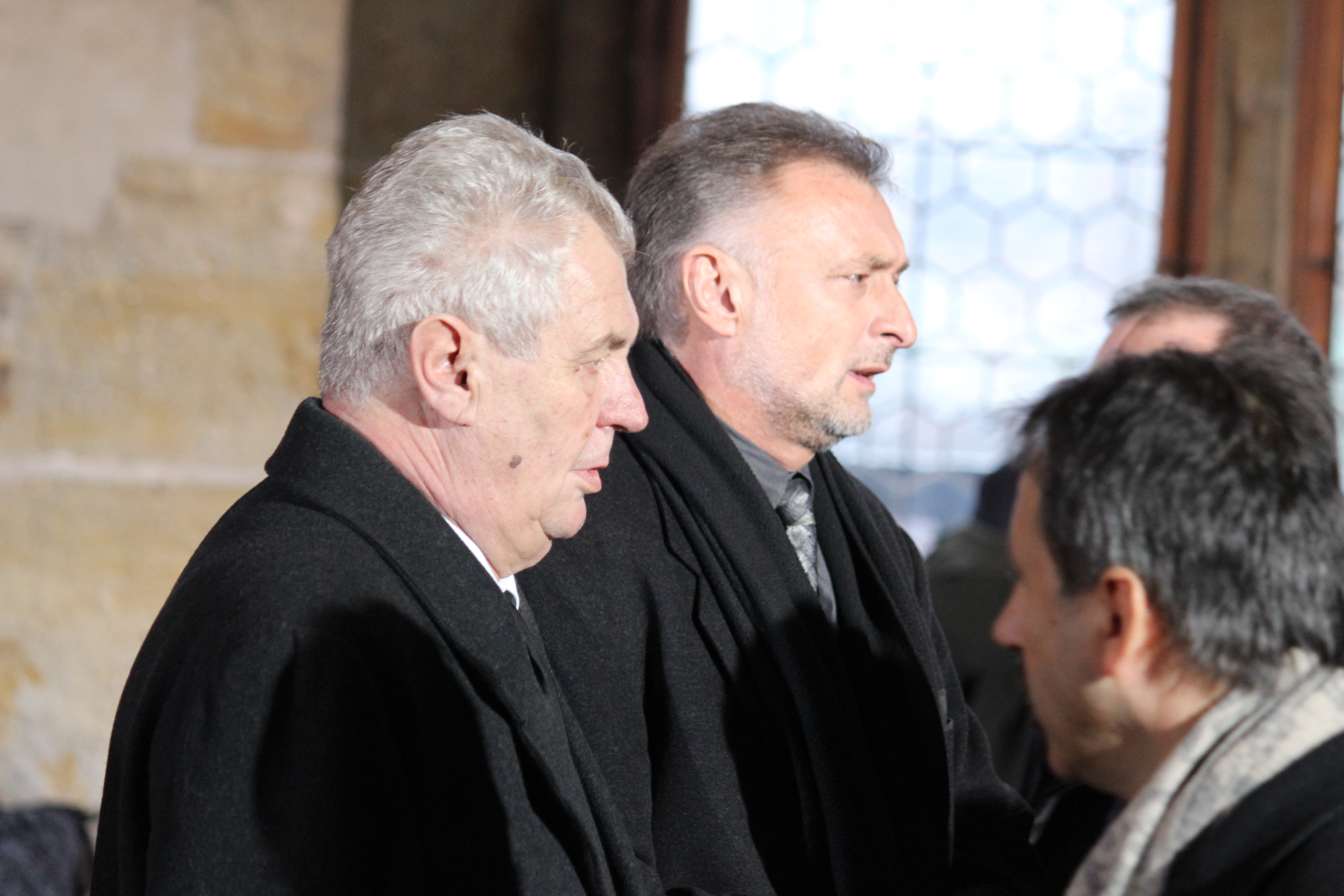 Ve středu 21. 12. 2011 byla rakev s ostatky Václava Havla přemístěna z Pražské křižovatky do Vladislavského sálu Pražského hradu. This photograph was taken with a DSLR from WMCZ's Camera grant.